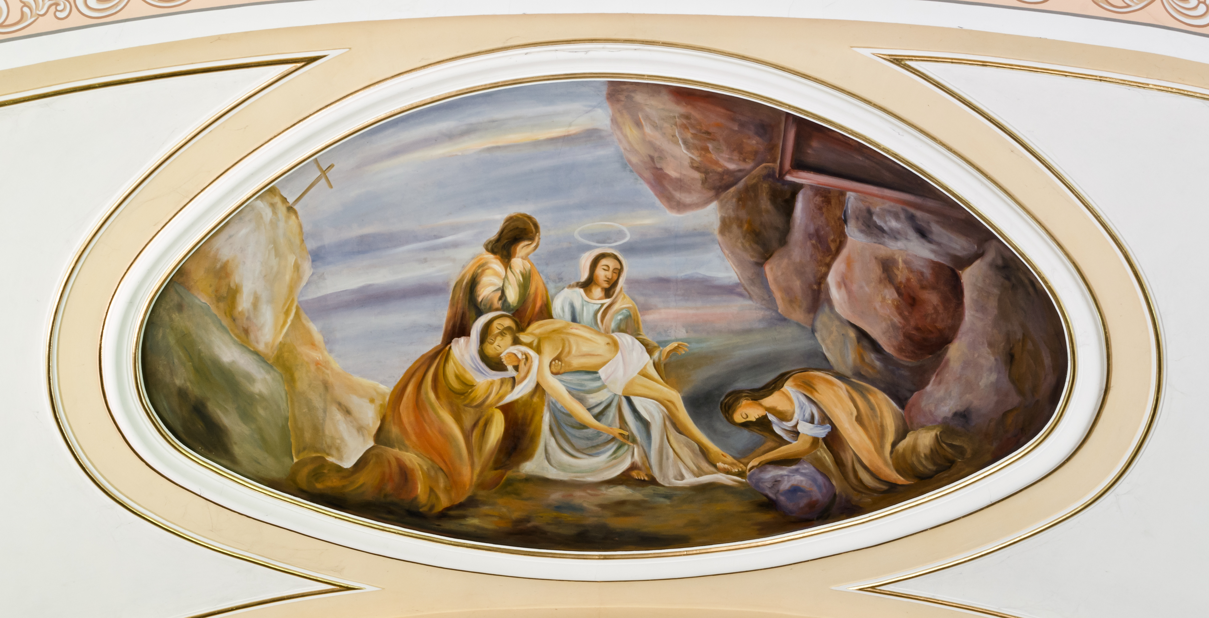 Polanica-Zdrój, kościół par. p.w. Wniebowzięcia NMP, 1910